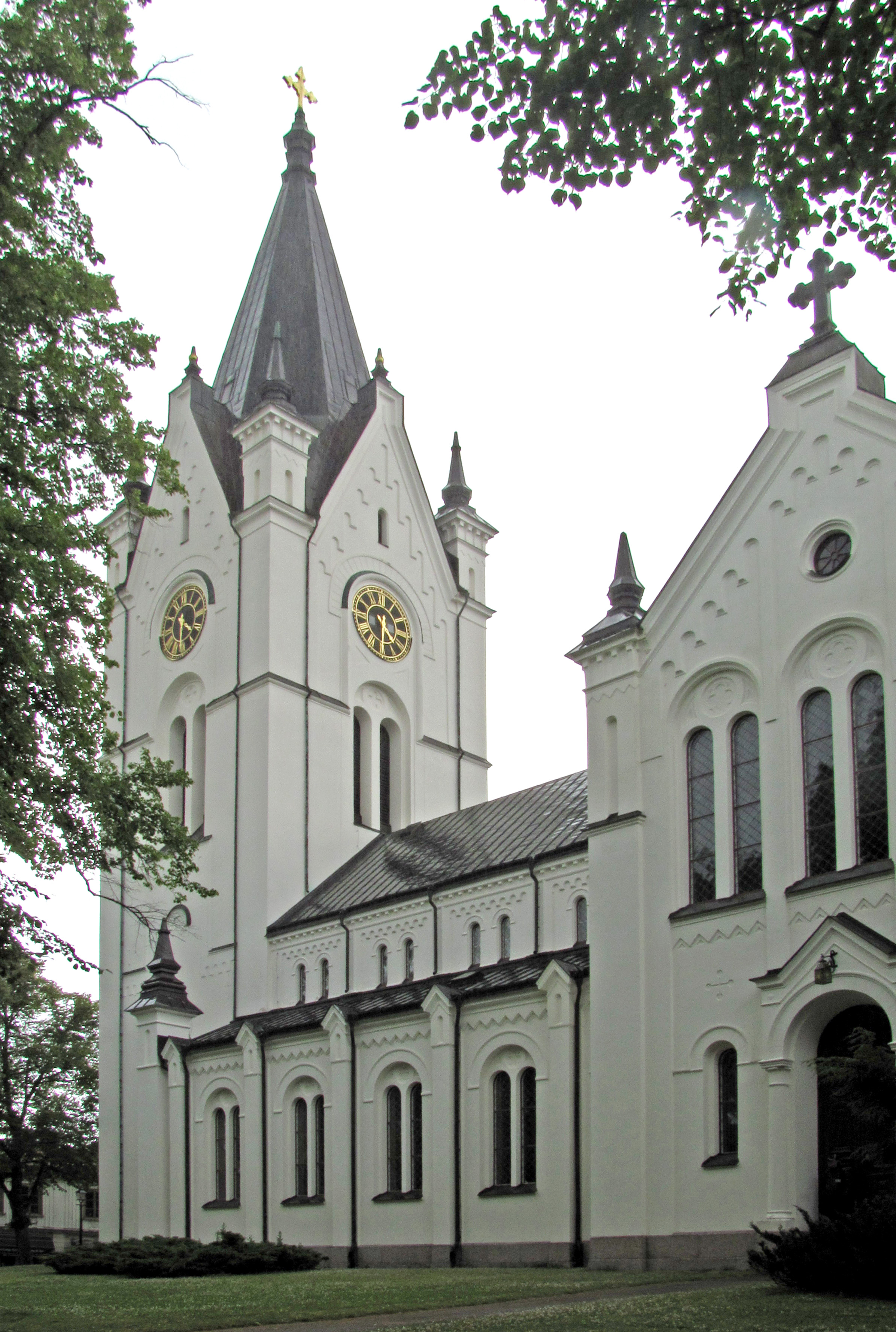 Nora kyrka, Västerås stift